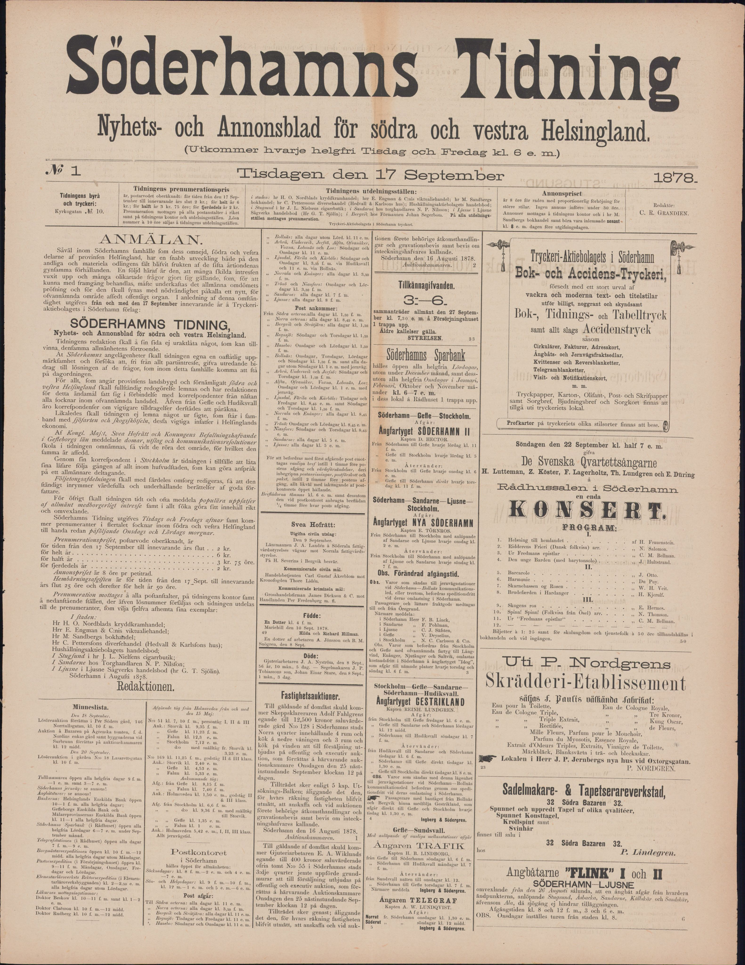 Första ordinaries numret av Söderhamns Tidning.